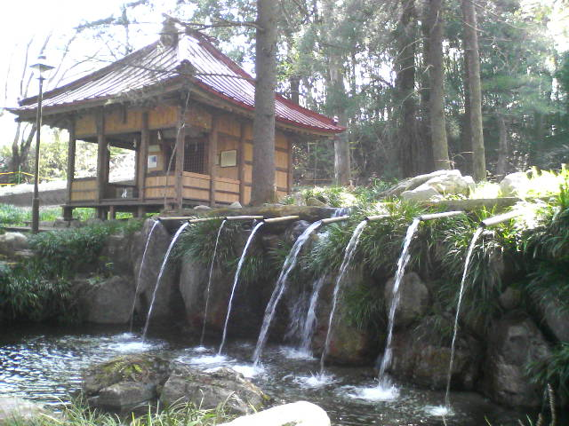 藤垈の滝画像3